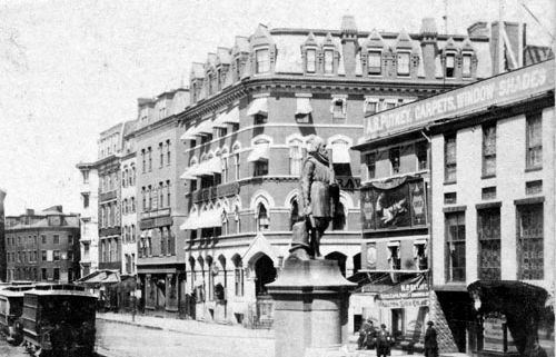 Boston, Massachusetts